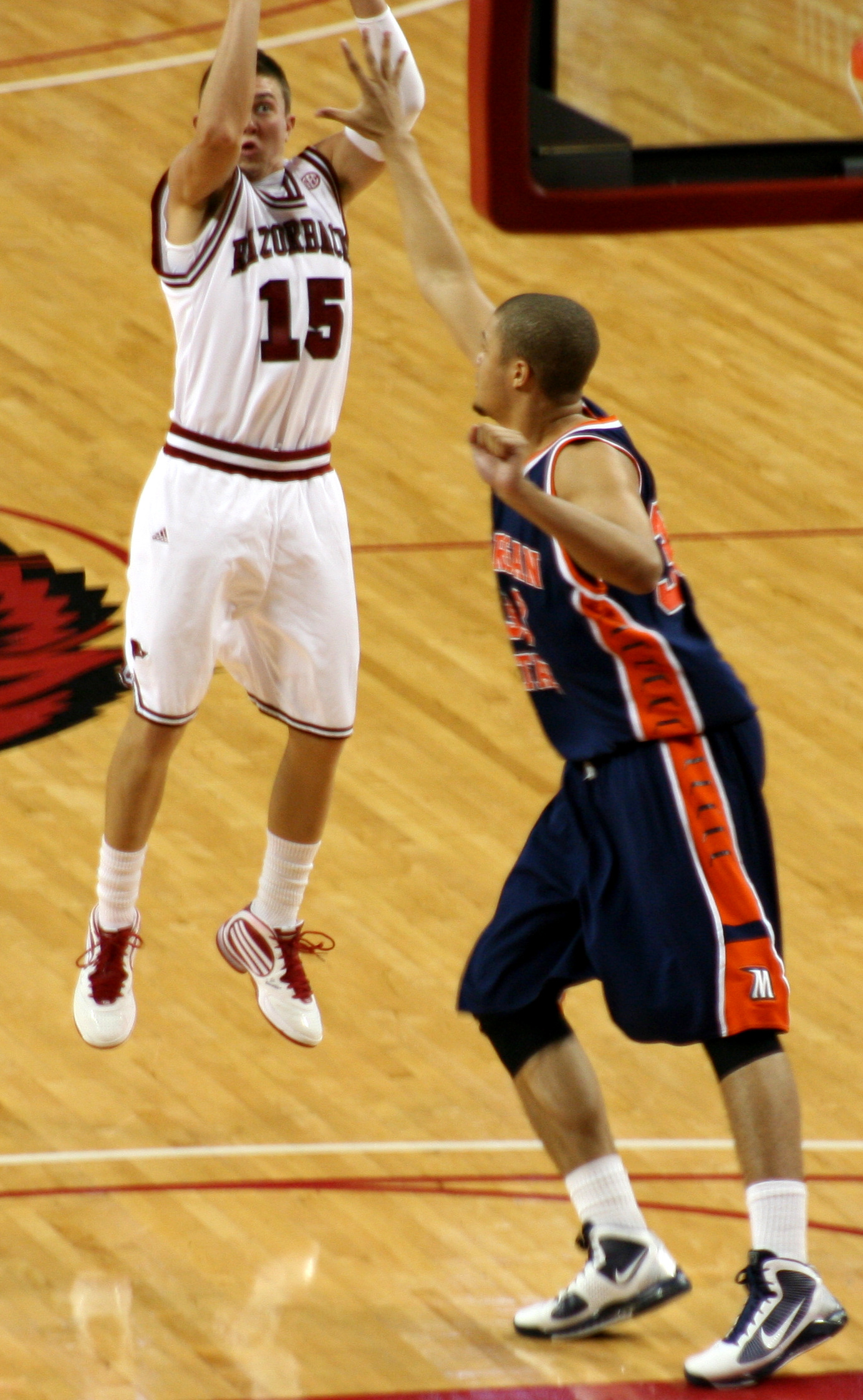 Rotnei Clarke shoots over a Morgan State defender November 25, 2009